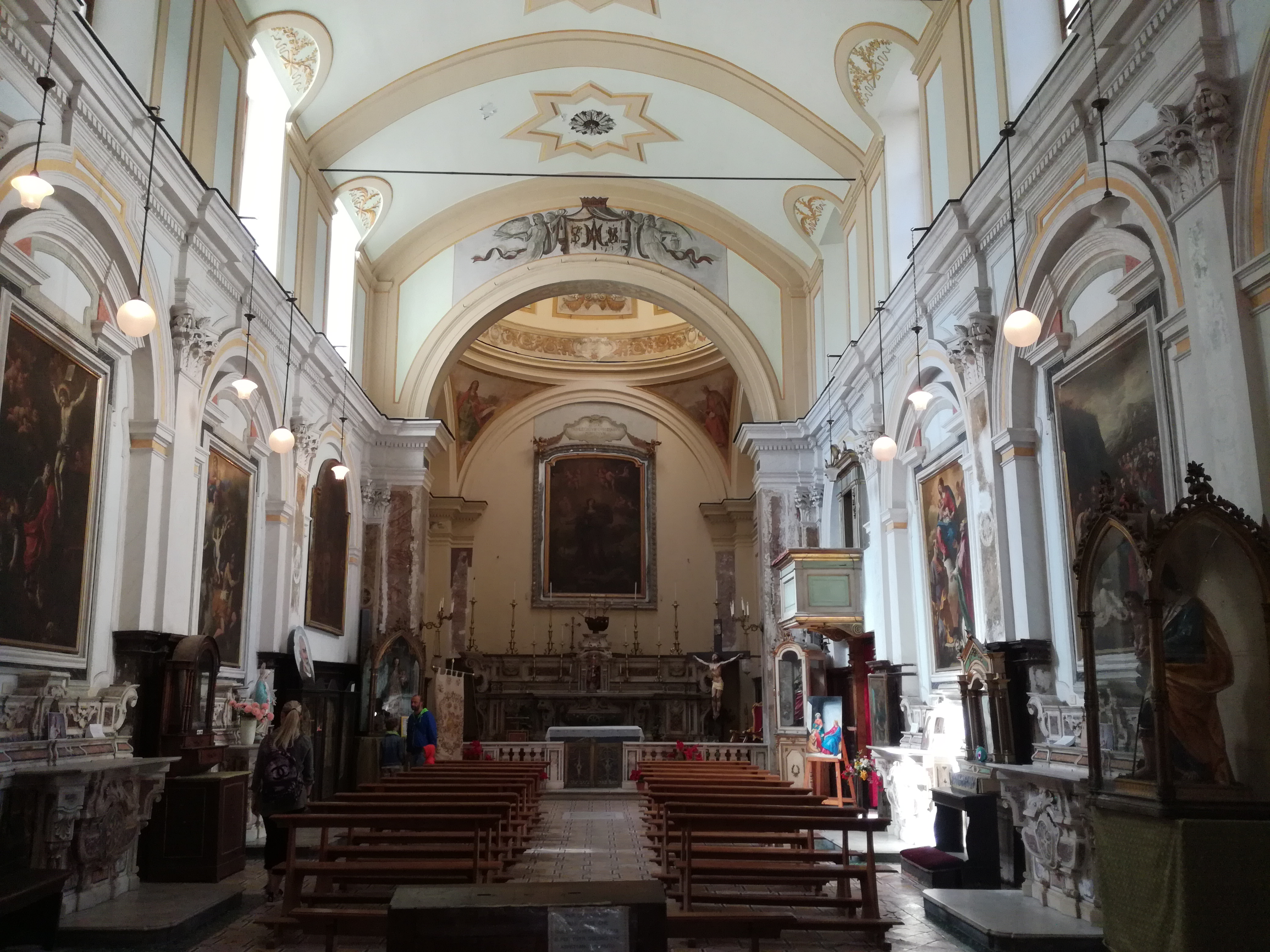 Chiesa di Santa Marta (Napoli)